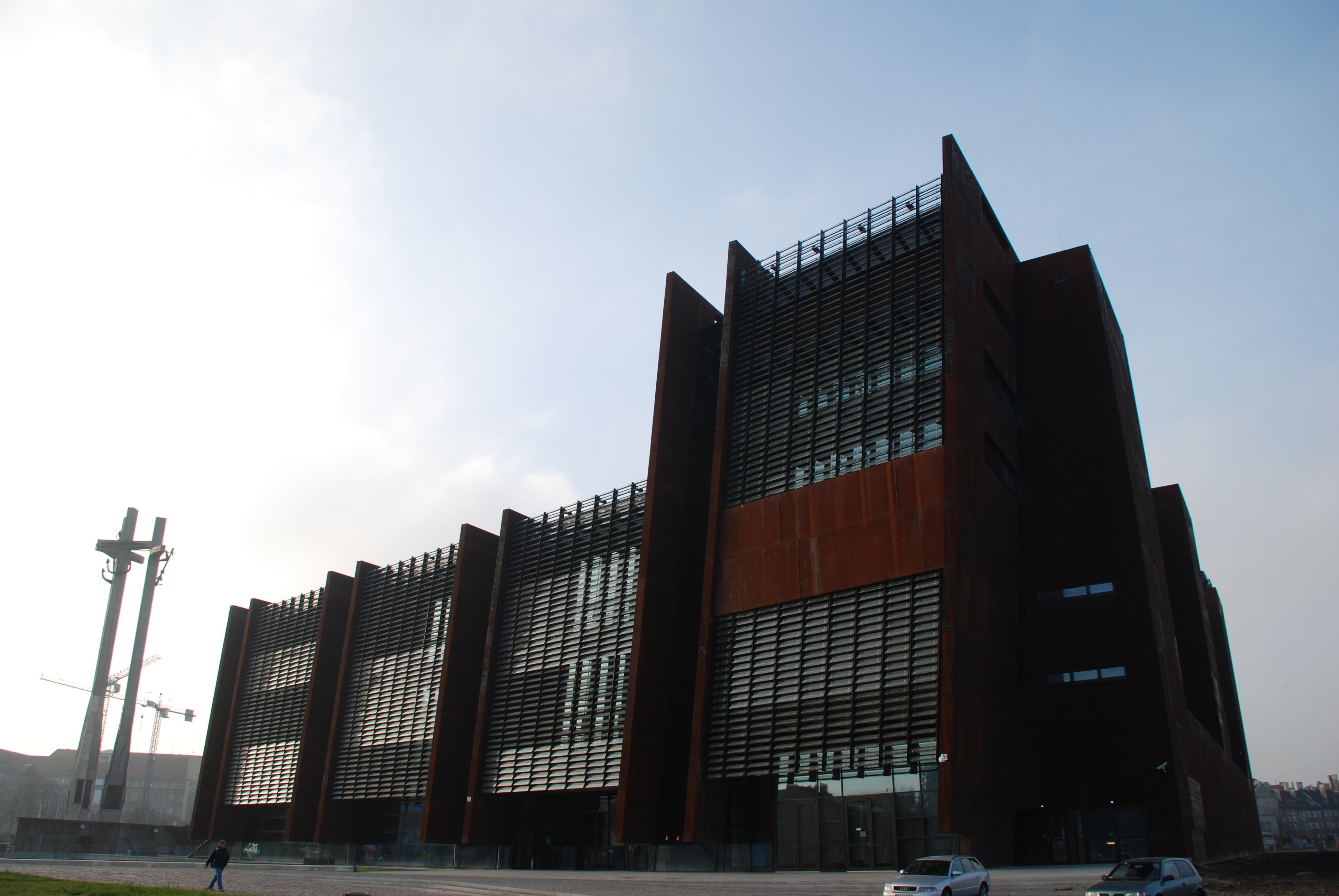 Budynek Europejskiego Centrum Solidarności w Gdańsku